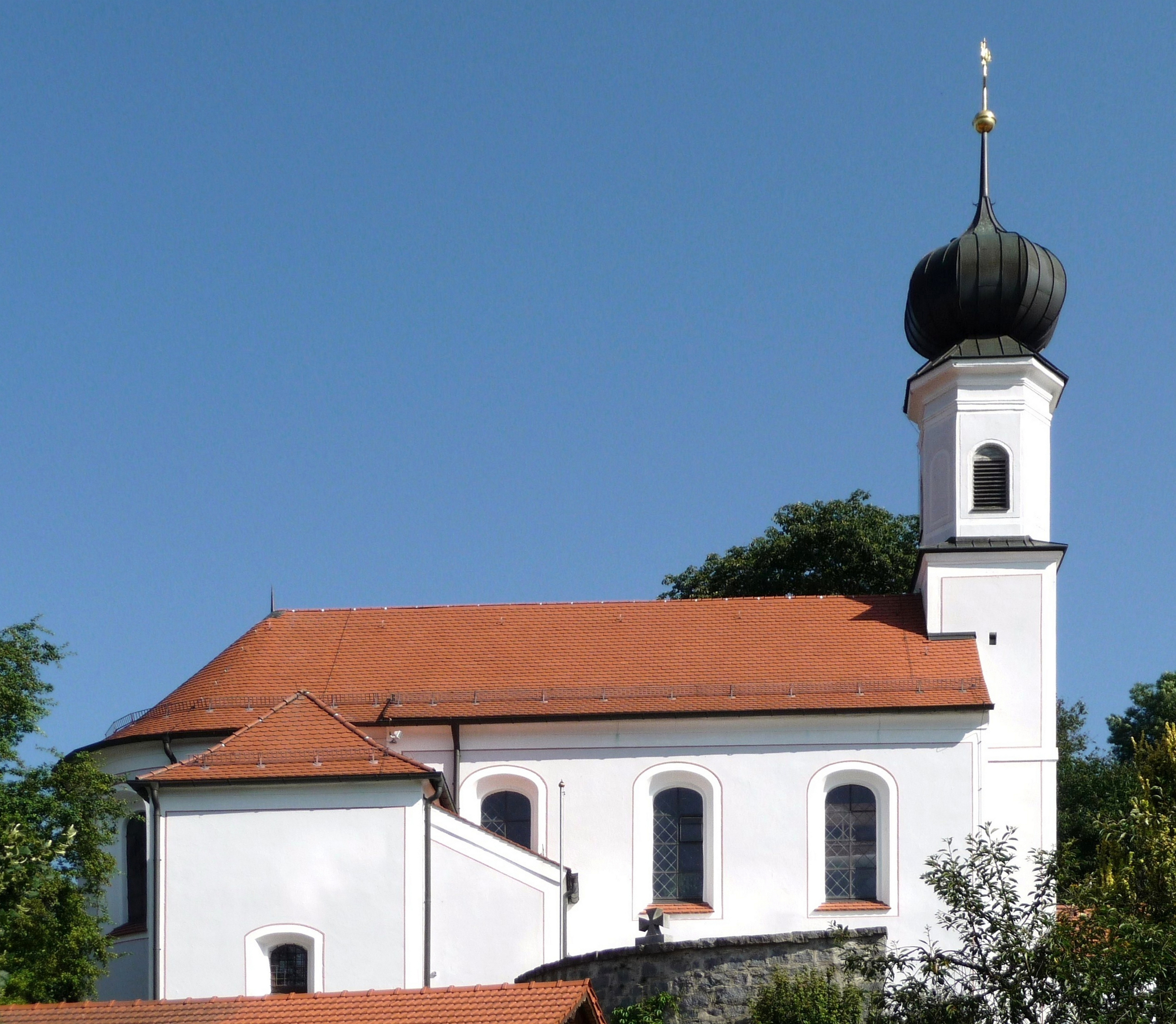 Die Pfarrkirche St. Nikolaus in Sattelbogen